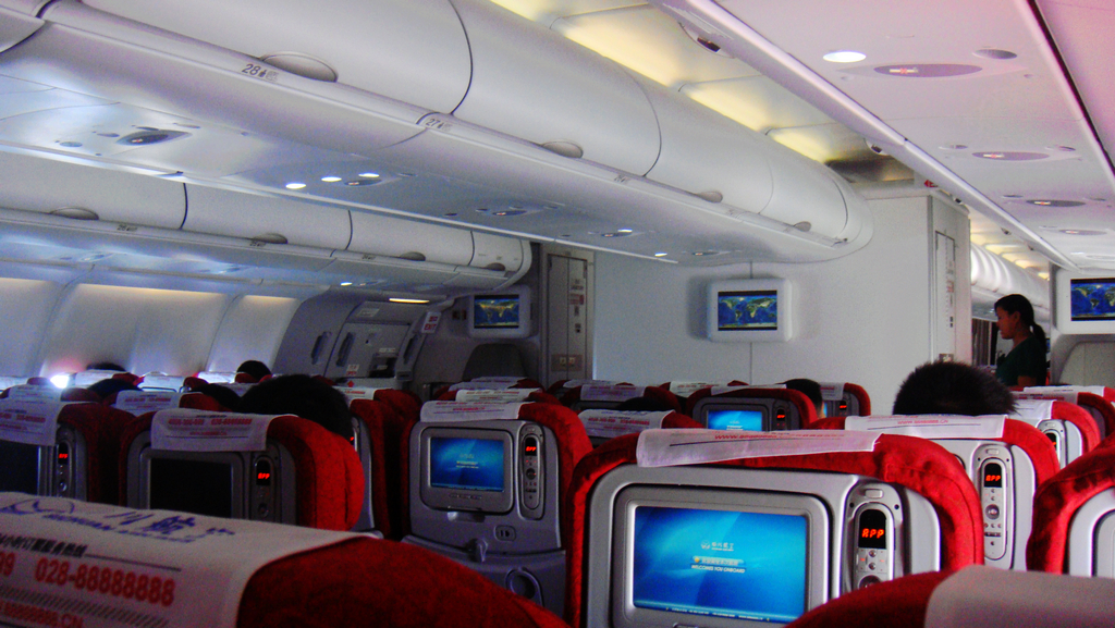 中文（中国大陆）: 川航330客舱